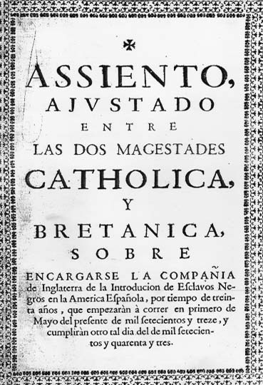 Assiento ajustado entre las dos Magestades Catholica y Bretamica sobre encargarse la Compañia de Inglaterra de la introducción de esclavos negros en la América Española